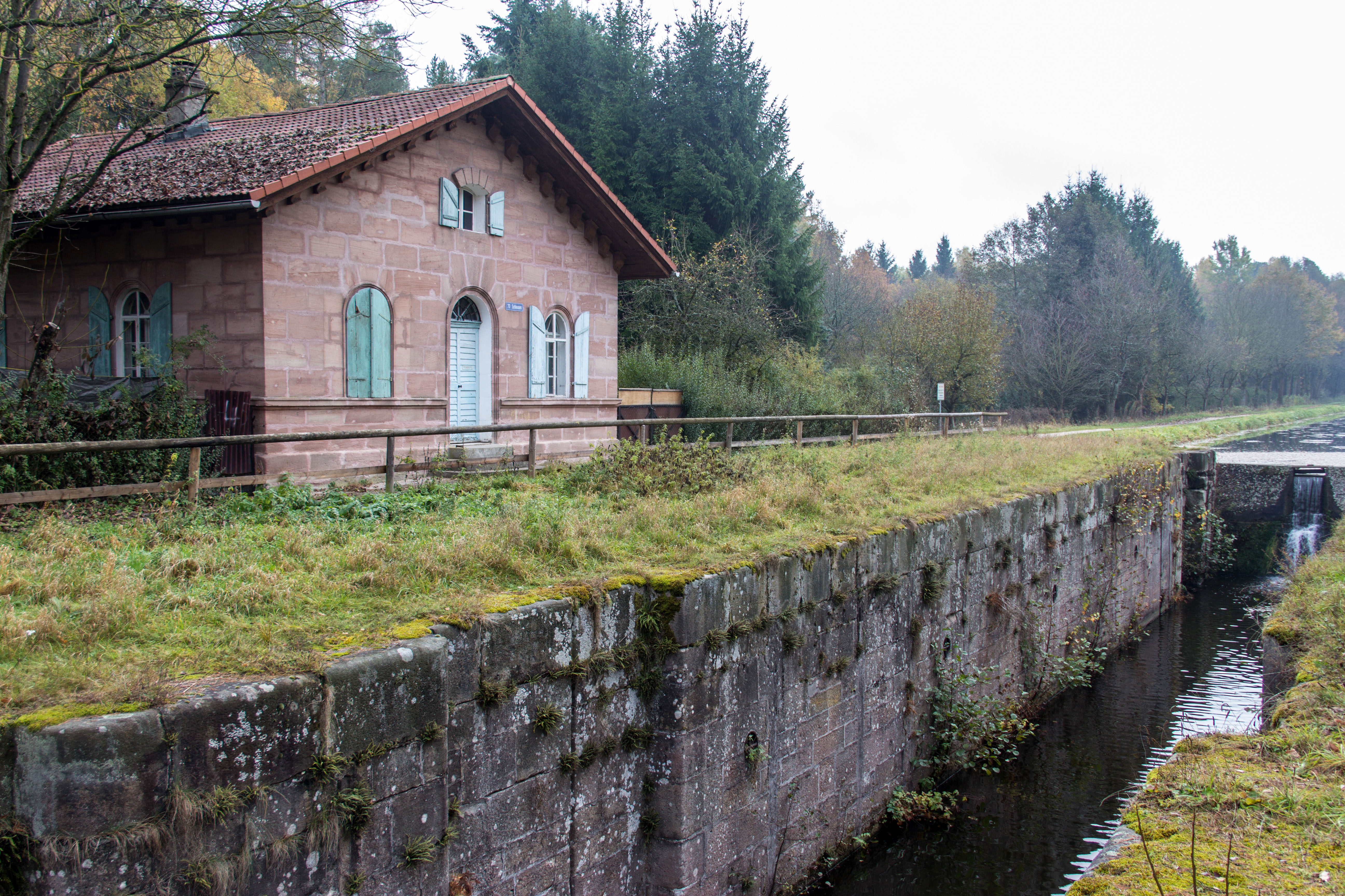 Ludwig-Donau-Main-Kanal, Schleuse 70